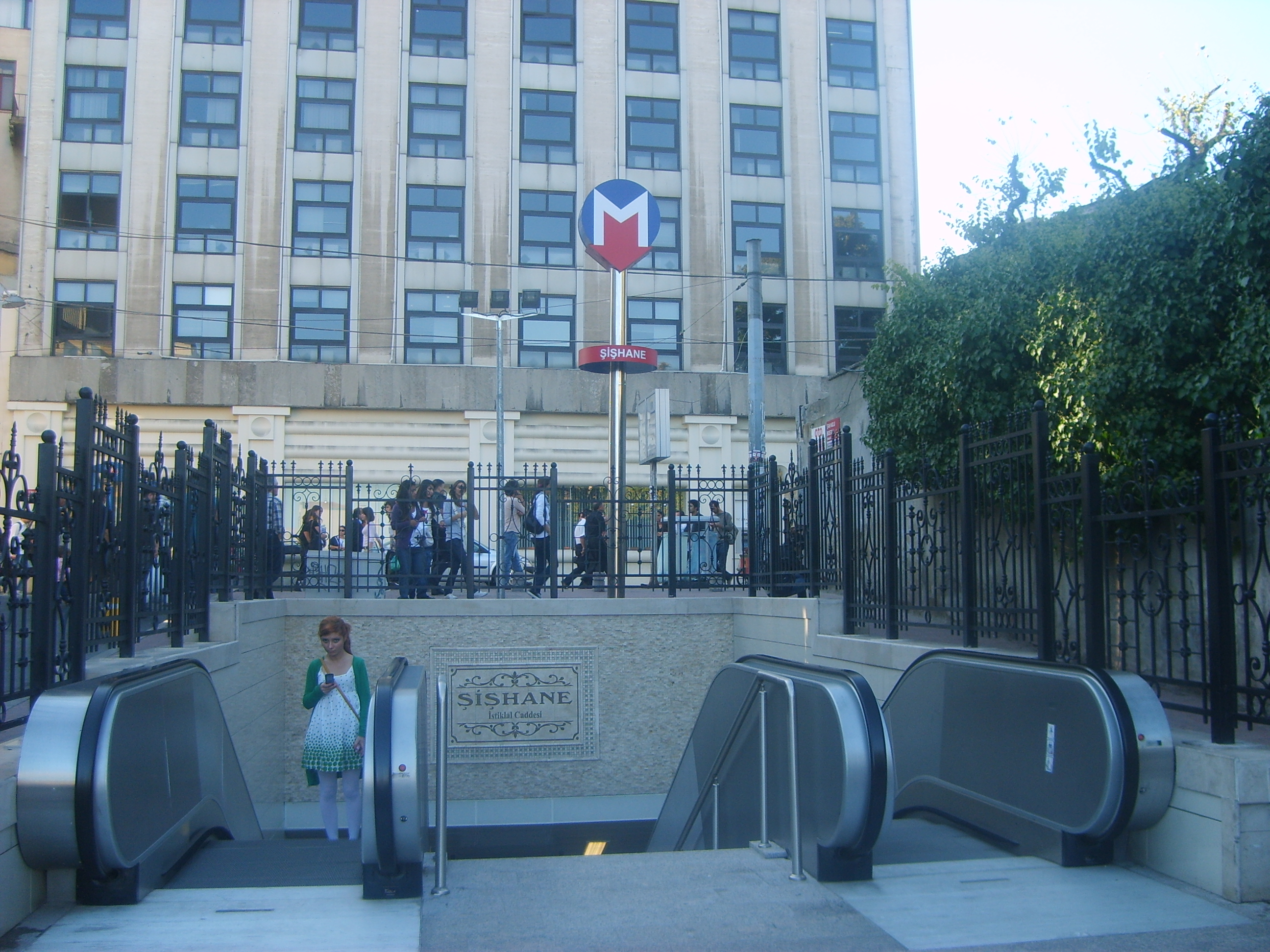 Istanbul Metrosu Şişhane istasyonu, İstiklâl Caddesi Girişi